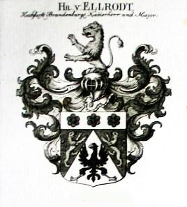 Wappen des Herren von Ellrodt ("Hochfürstl. Brandenburg. Kammerherr und Major")